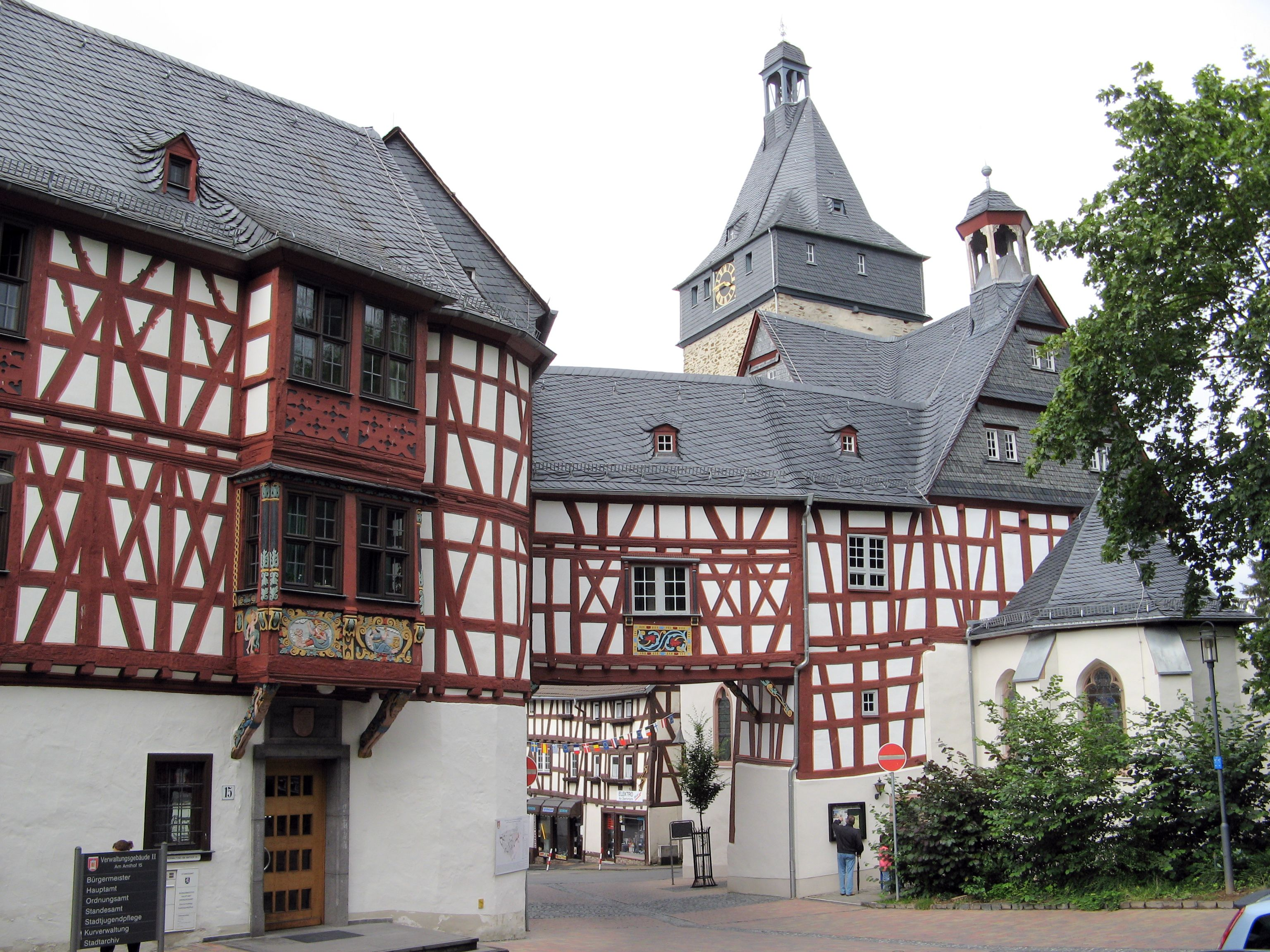 Die Südostfassade des Amthofs in Bad Camberg, Hessen (Weitwinkelaufnahmen)